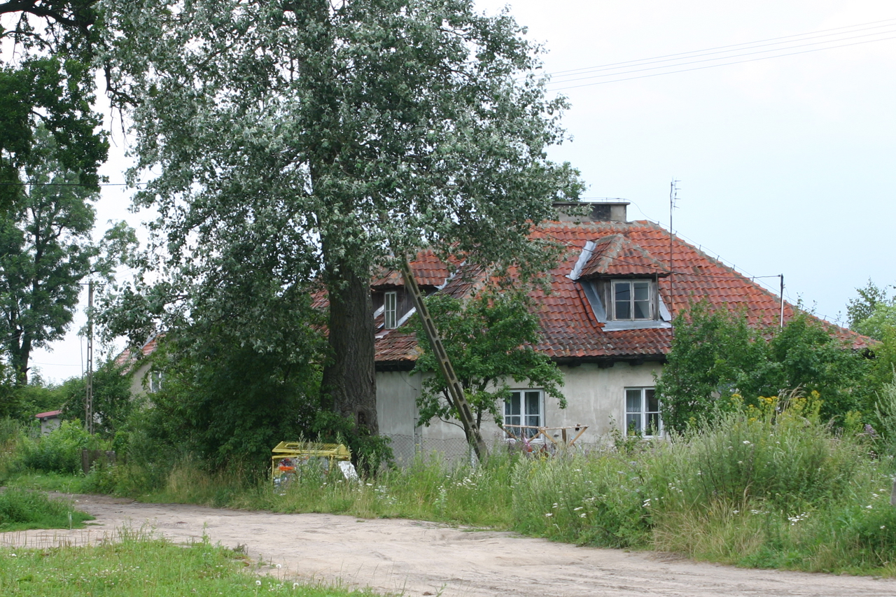 Chojnica, Polska, powiat kętrzyński.